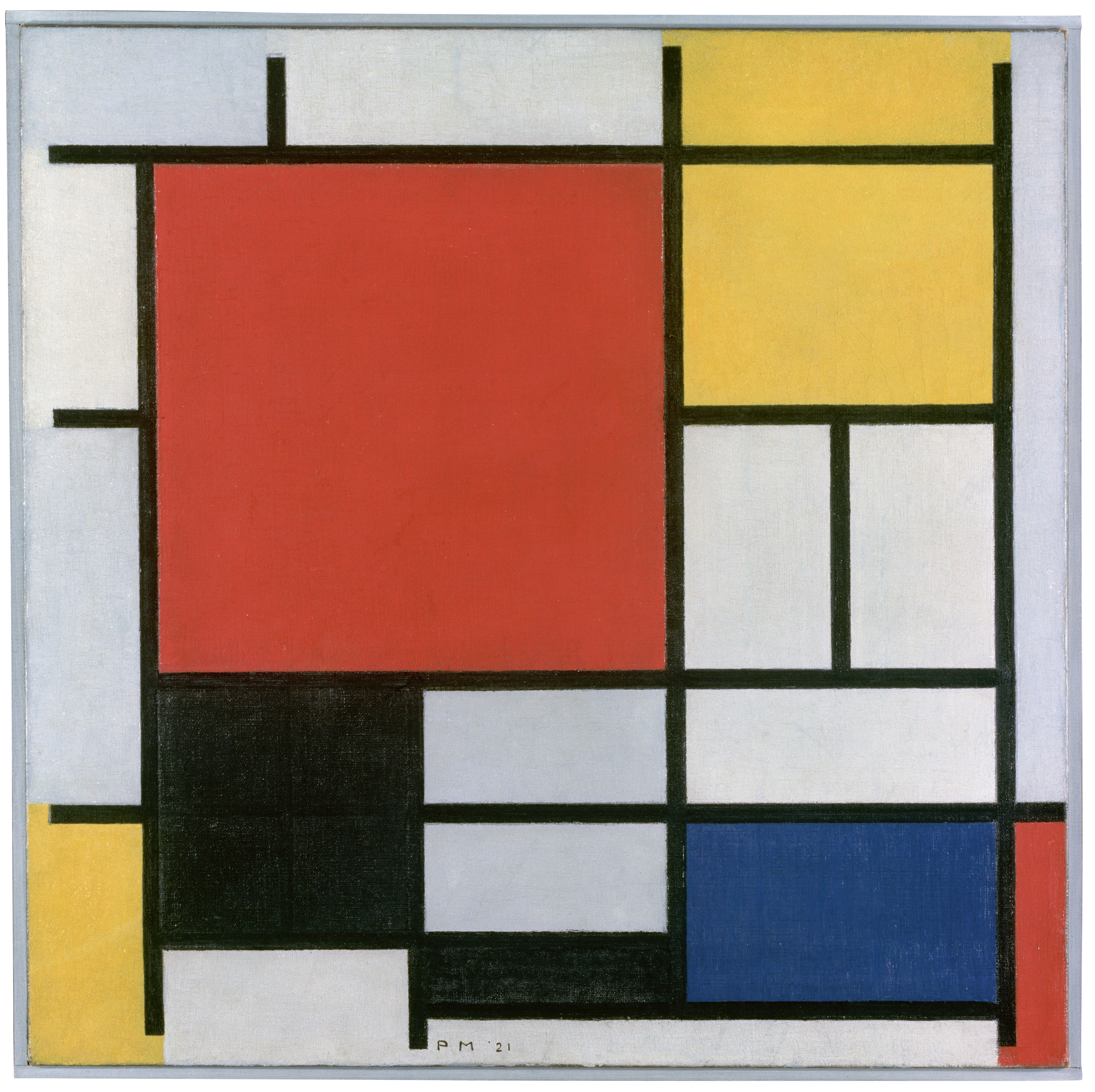 Compositie met groot rood vlak, geel, zwart, grijs en blauwlabel QS:Lfr,"Composition en rouge, jaune, bleu et noir" label QS:Les,"Composición en rojo, amarillo, azul y negro" label QS:Len,"Composition in red, yellow, blue and black"